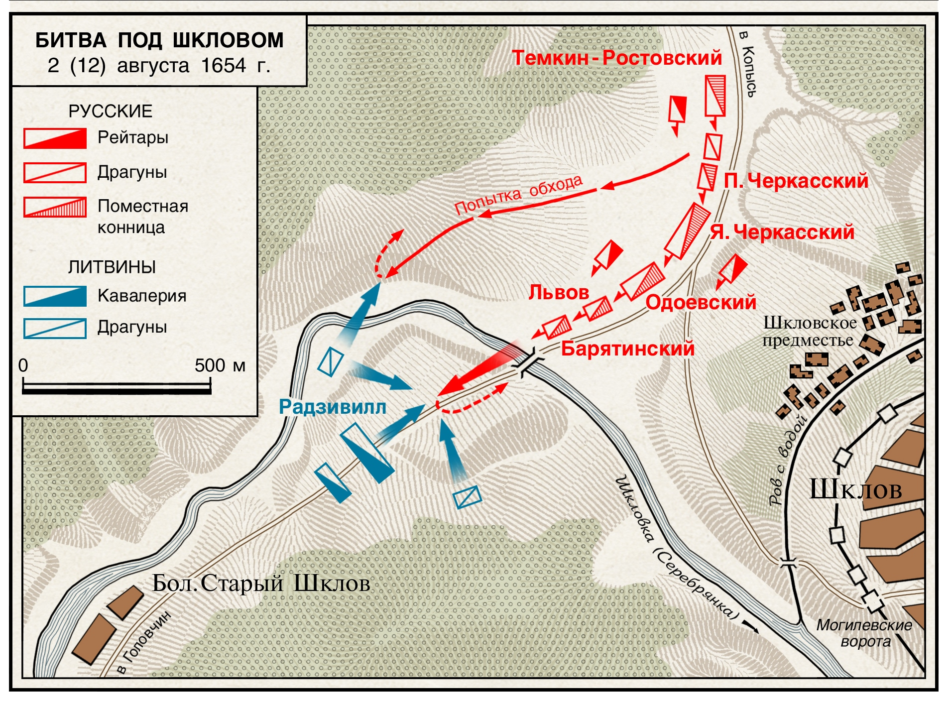 Схема боя под Шкловом 2 (12) августа 1654 года в ходе русско-польской войны 1654-67 гг. Схема опубликована в монографии И.Б. Бабулина Смоленский поход и битва при Шепелевичах 1654 года. М.: Фонд «Ратное дело», 2018. Автор схемы Ю. Юров. Схема размещена с согласия И.Б. Бабулина